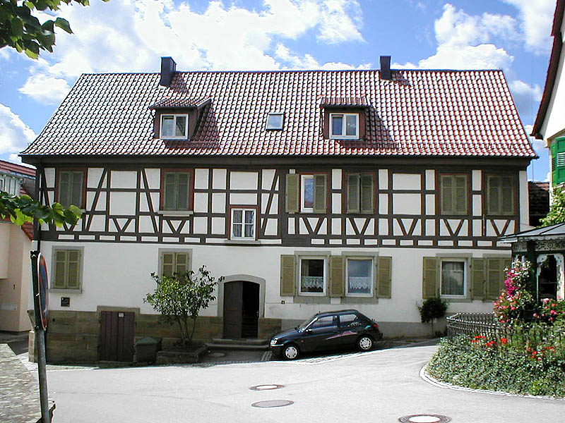 Schulhaus von 1852 bei der Kirche in Löchgau